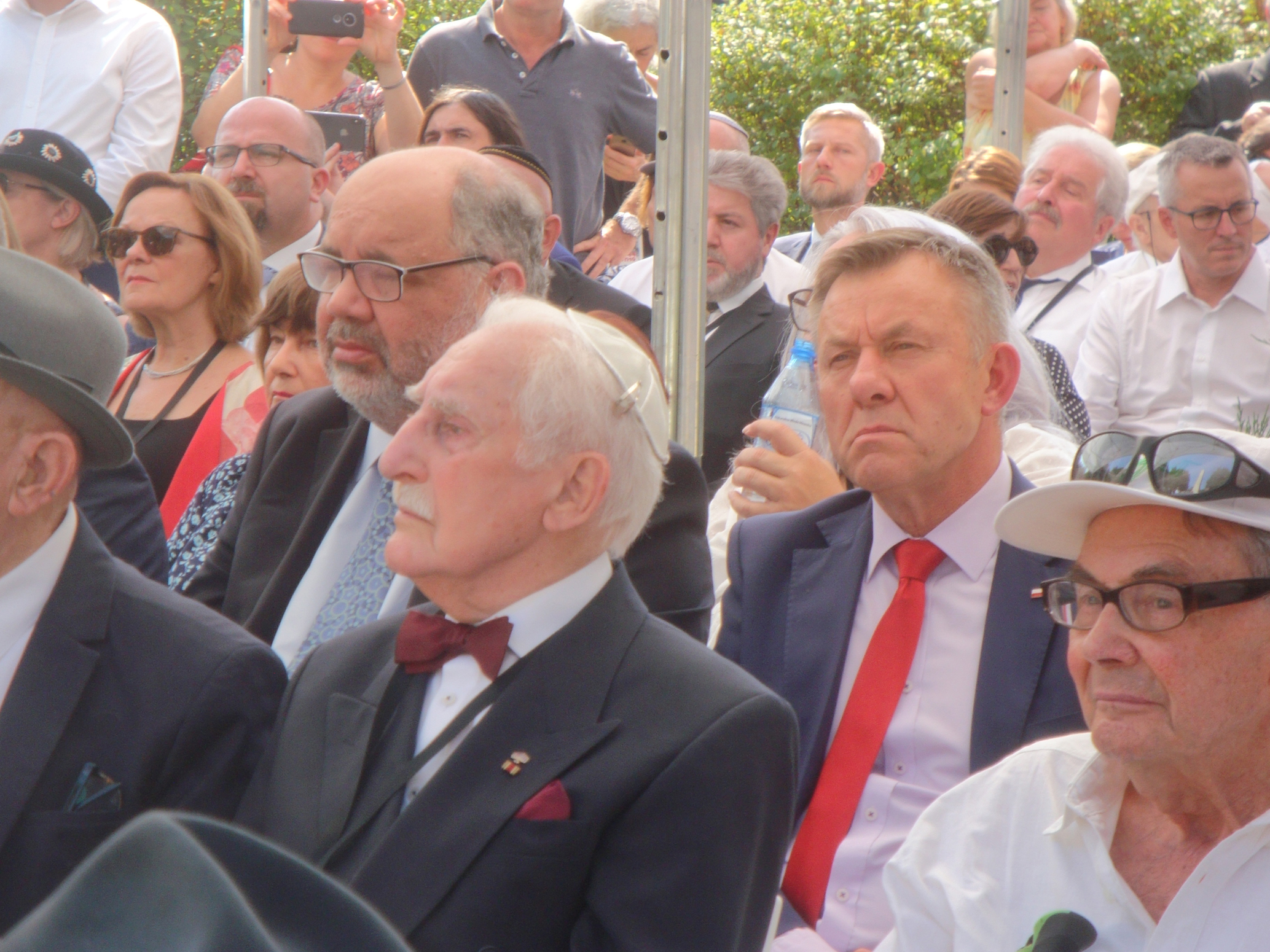 Leon Weintrib i Marian Turski na cmentarzu żydowskim w 75 rocznicę likwidacji Litzmannstadt Getto 2019 fot M Z Wojalski